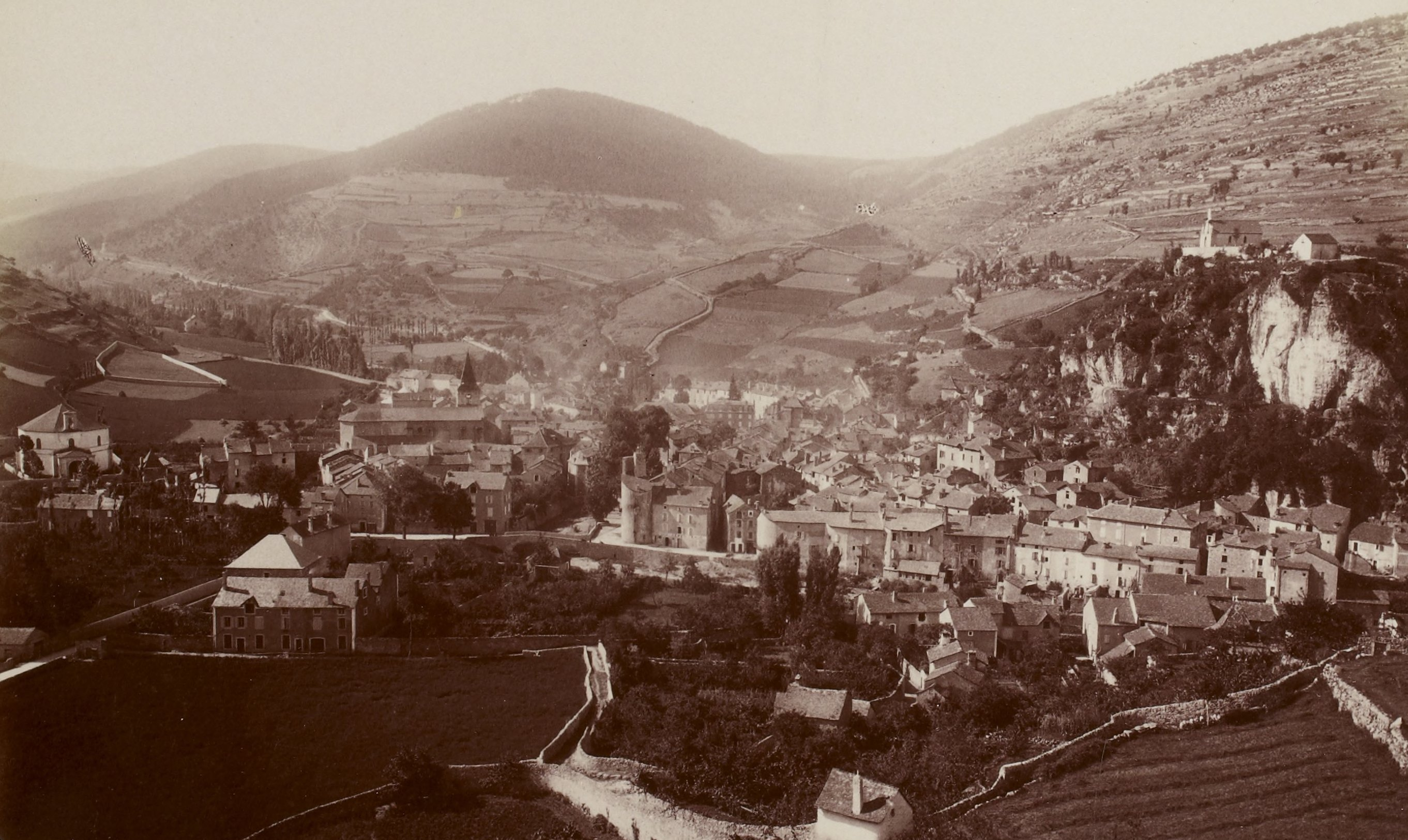 Excursion dans la région des Causses, offert par le photographe Casimir Julien à James Jackson (1843-1895) en 1892